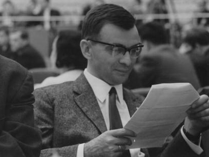 Title: Berlin, 1. DSV-Jahreskonferenz, M. Engelhardt (Ausschnitt) People in the image: Manfred Engelhardt: Stellvertretender Chefredakteur des Berliner Rundfunks, DDR Factual corrections and alternative descriptions are encouraged separately from the original description. Additionally errors can be reported at this page to inform the Bundesarchiv. Original historic description: Zentralbild Hochneder 17.1.1967 Berlin: 1. Jahreskonferenz des Deutschen Schriftstellerverbandes vom 2.11.-4.11.1966 in der Kongreßhalle Der Schriftsteller Herbert Nachbar und der Hauptabteilungsleiter der Dramaturgie-Produktion des Berliner Rundfunks, Manfred Engelhardt (links).